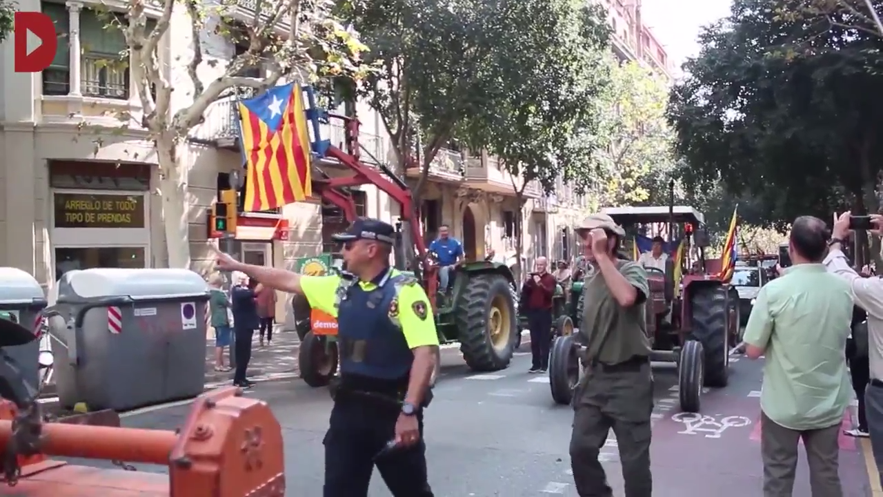 Més de 2.000 tractors han ocupat les carreteres catalanes per reivindicar la democràcia, denunciar la repressió i deixar clar el seu compromís amb el dret a decidir